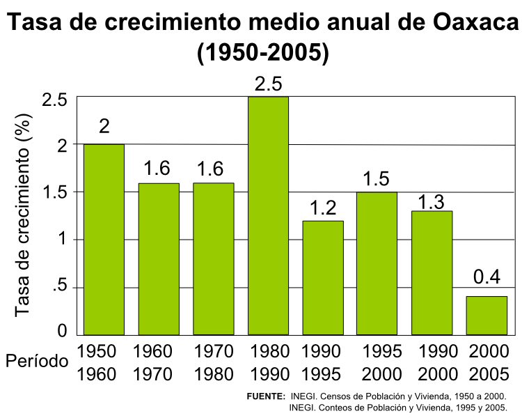 Tasas de crecimiento anual de Oaxaca de 1950 a 2005